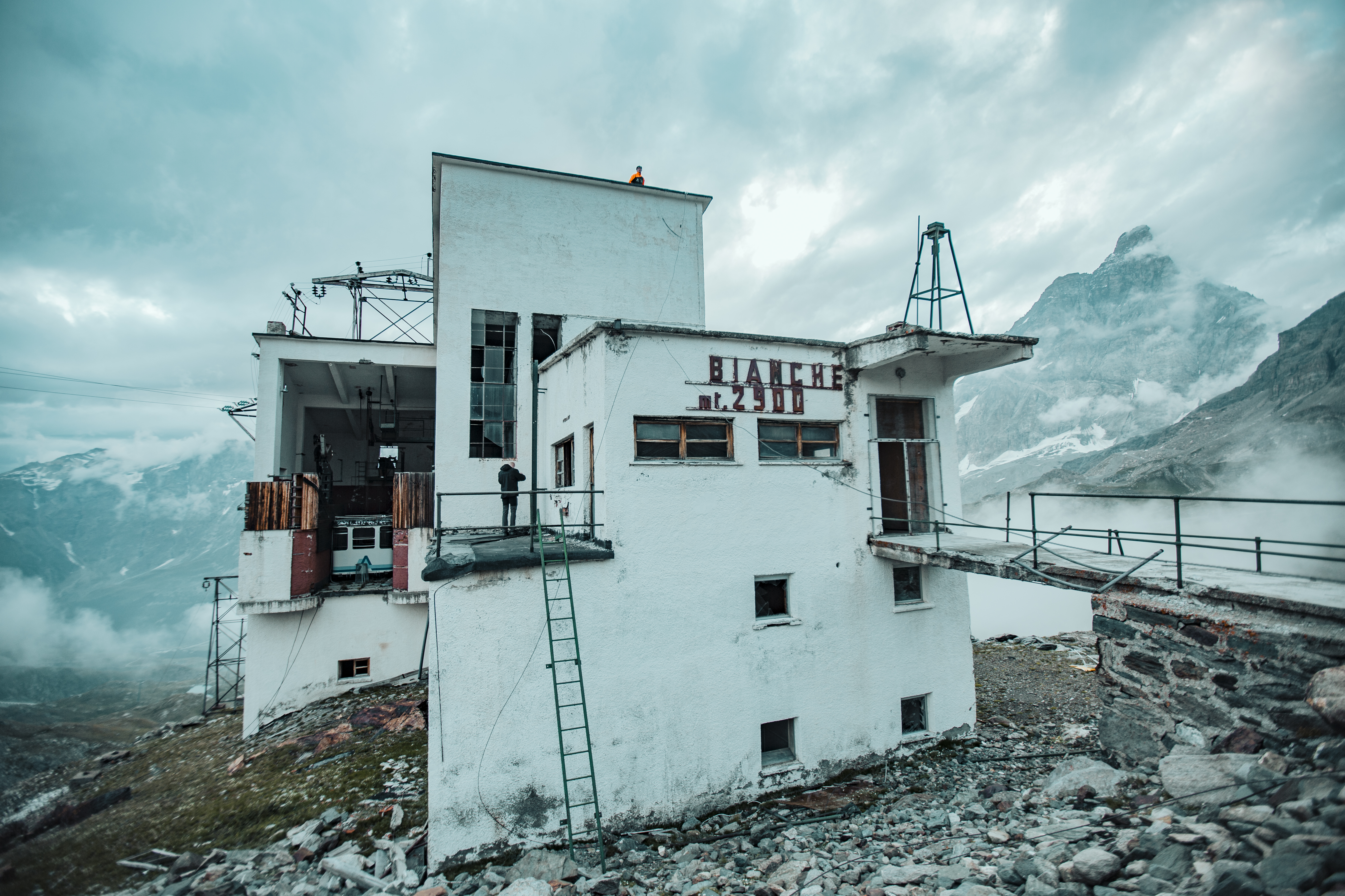 Cime Bianche (Untere Station), 2814 m